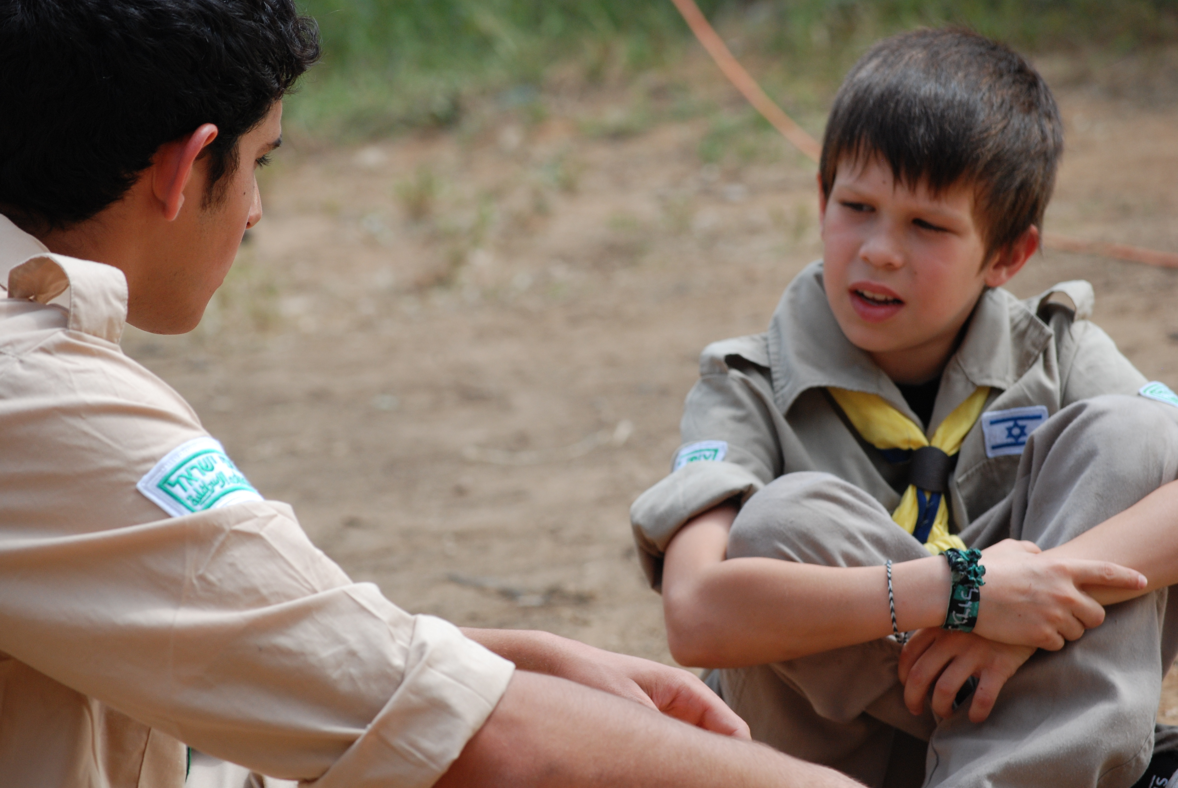 מדריך מדבר עם חניך בתנועת הצופים